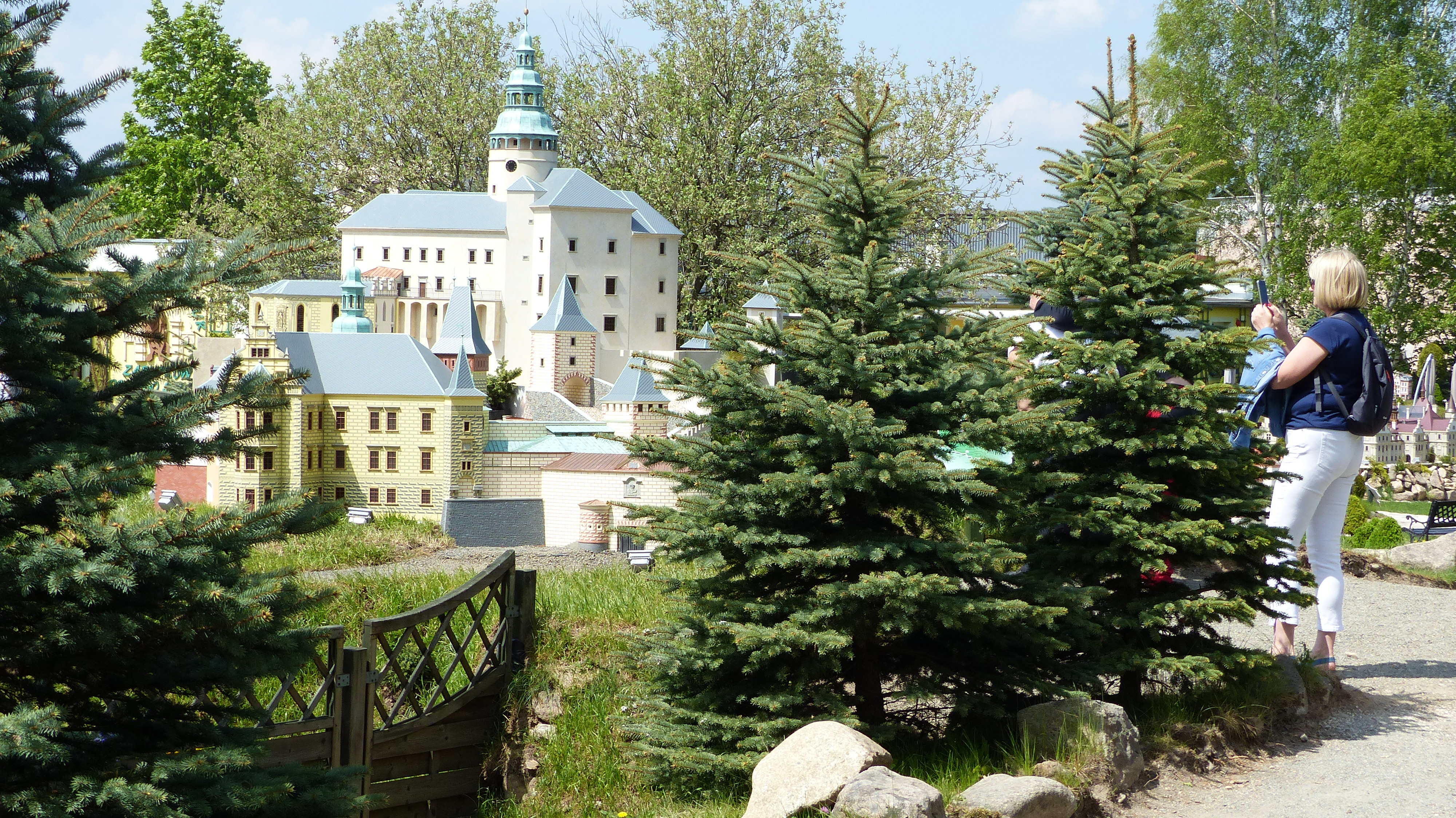 Miniaturen Park der Niederschlesischen Baudenkmäler in Kowary, Niederschlesien